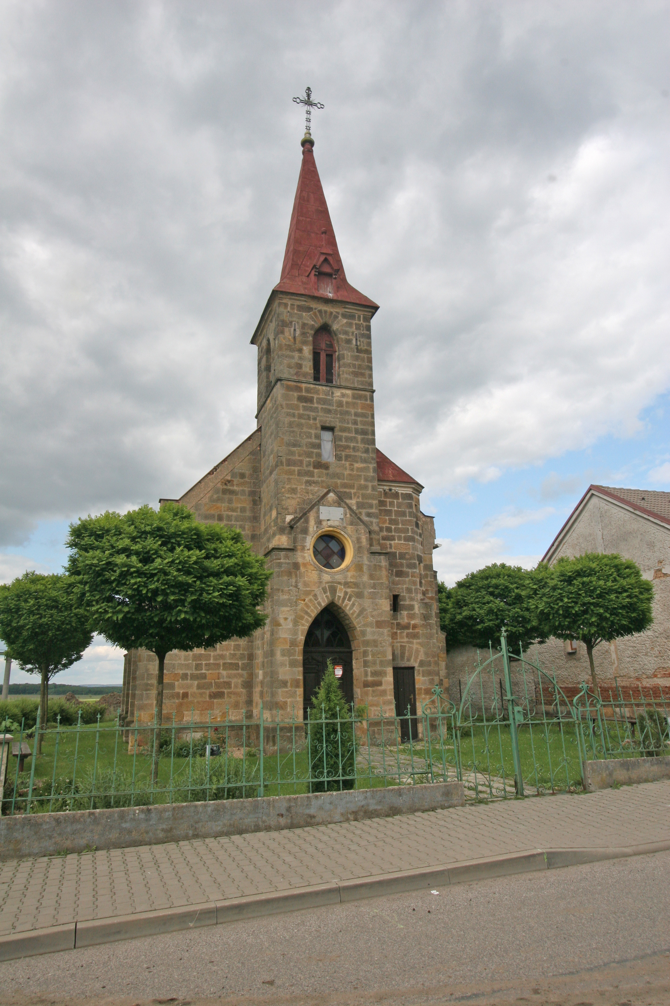 Prasek kostel Nejsvětějšího Srdce Páně